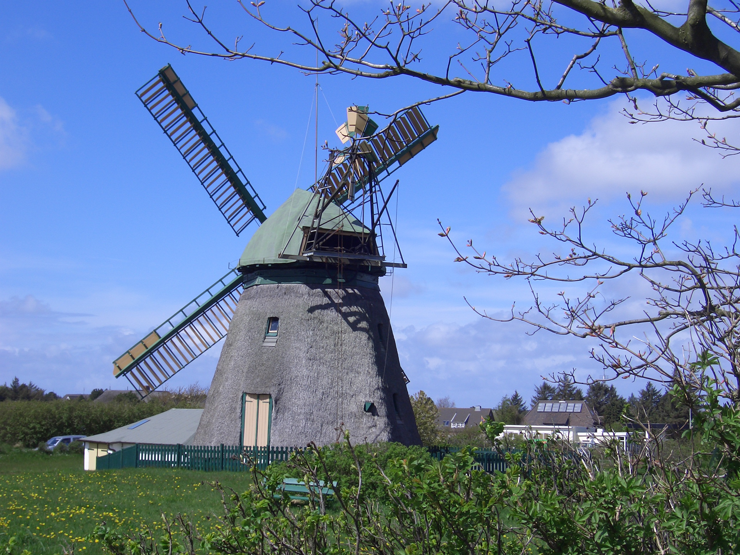 Mühle in Nebel/Amrum